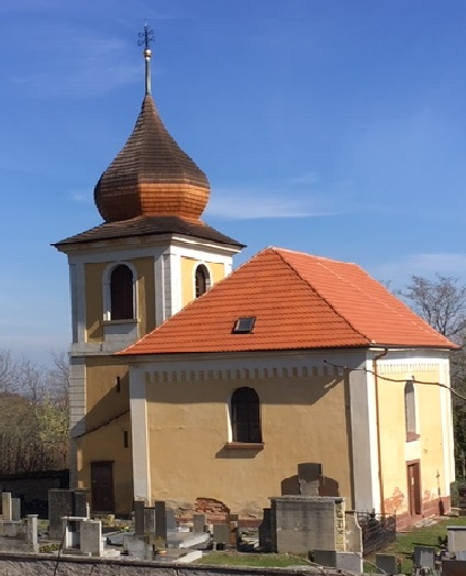 kostel sv. Havla, Ždánice u Kouřimi